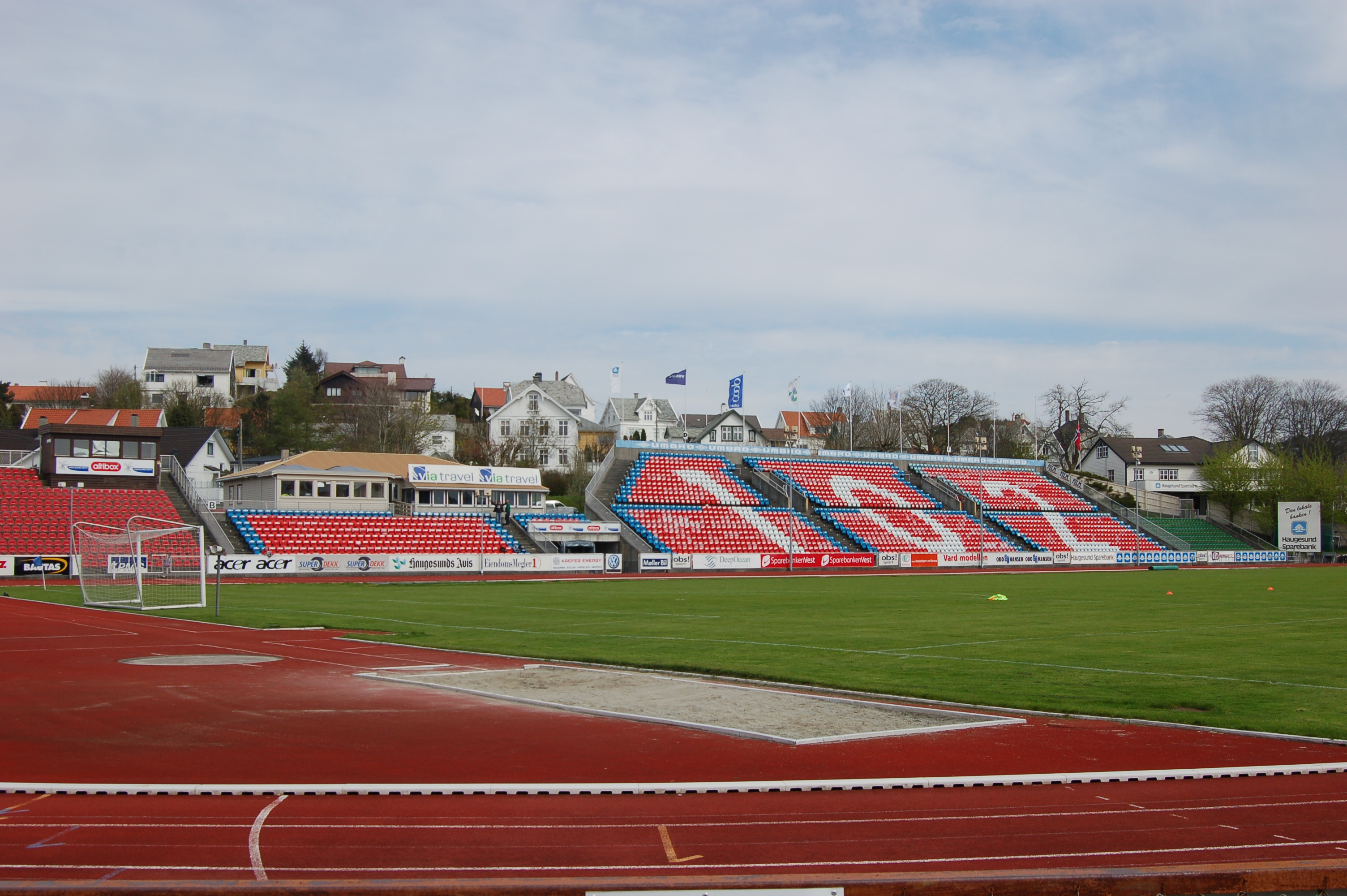 Haugesund stadion, hjemmebanen til Haugesund FK og Vard Haugesund